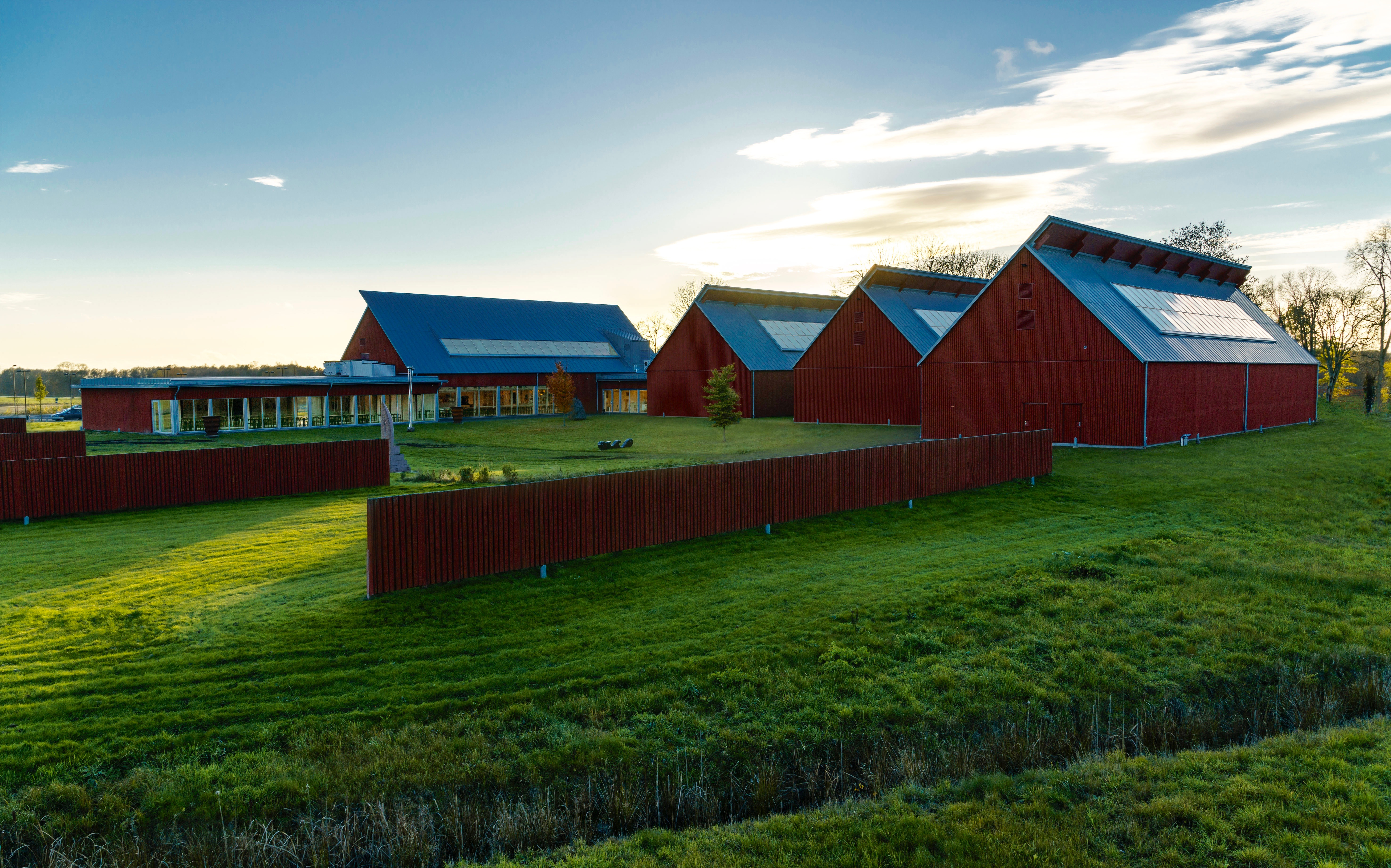 Vandalorum, Foto: John Nelander